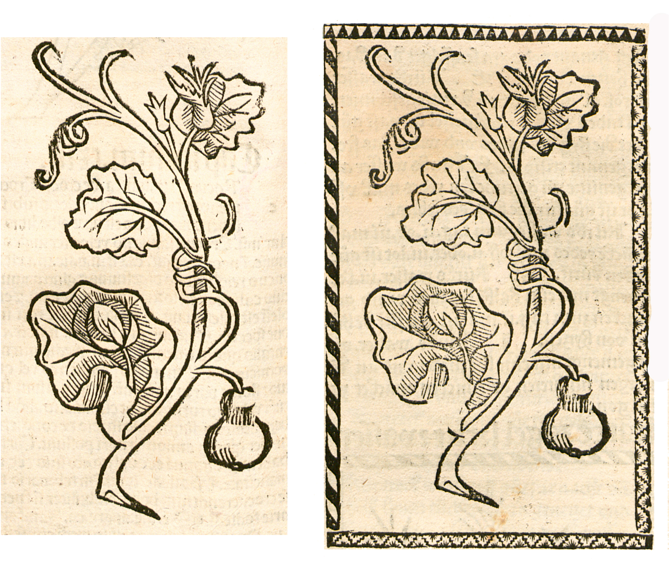 Abbildung von: Kürbs (Lagenaria siceraria)